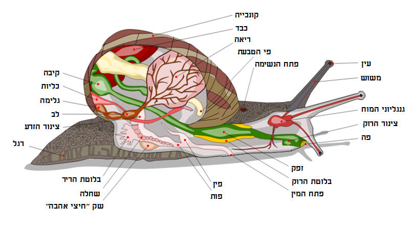 Diagram of a snail (Helix aspersa). Hebrew version